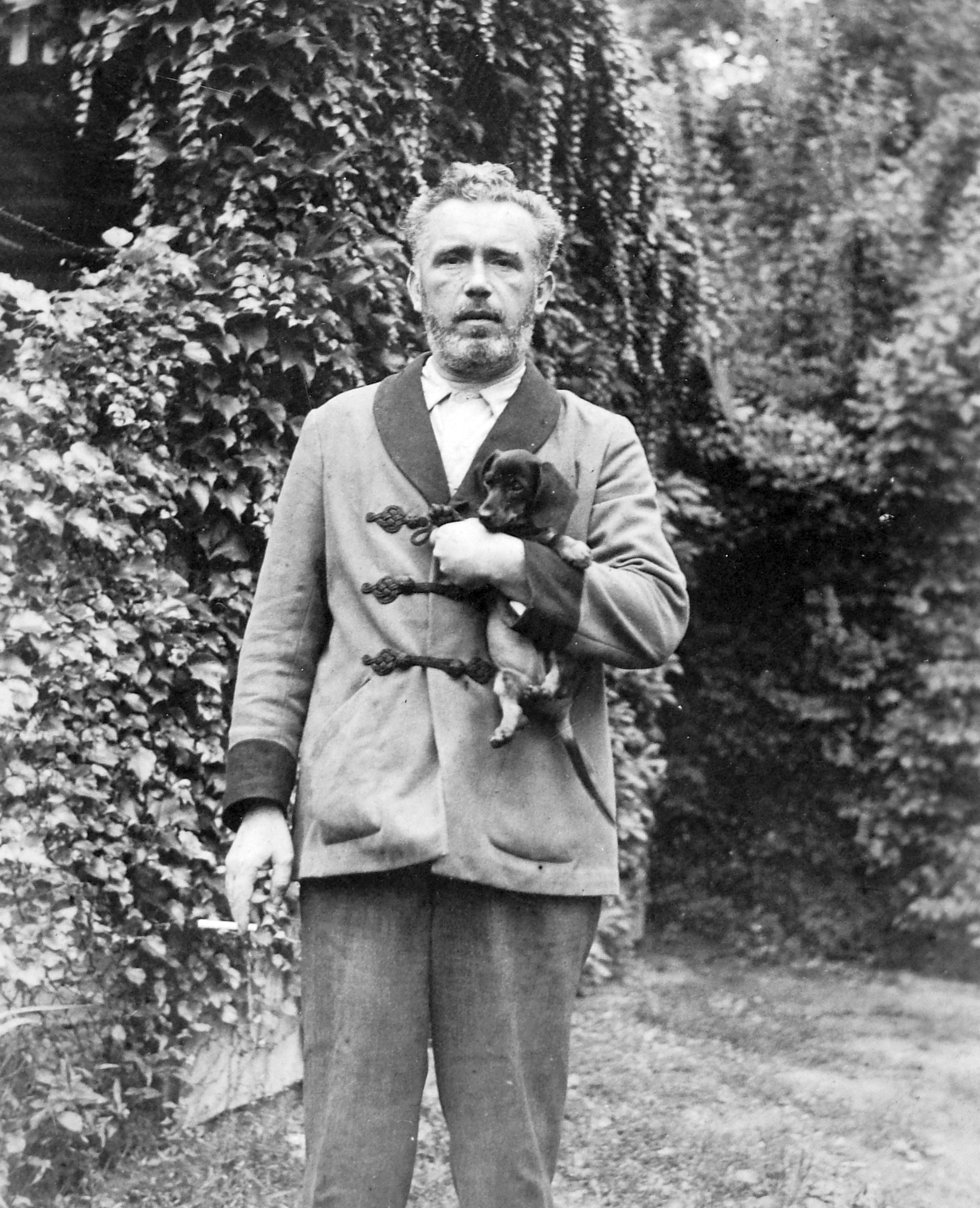 Tags: portrait, man, dog, smoking, smoking jacket